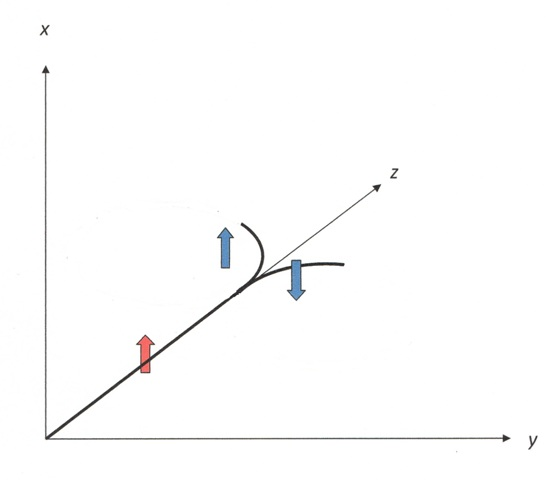 Spin-Bahn-Wechselwirkung bei Teilchenstreuung